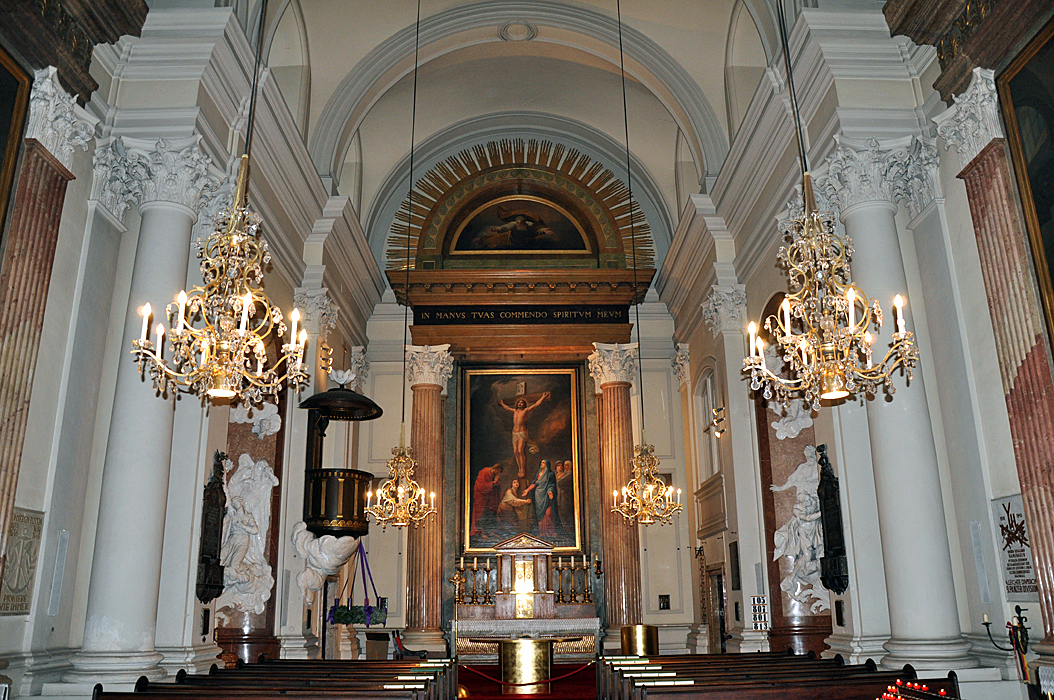 Inneres der Stiftskirche in Wien